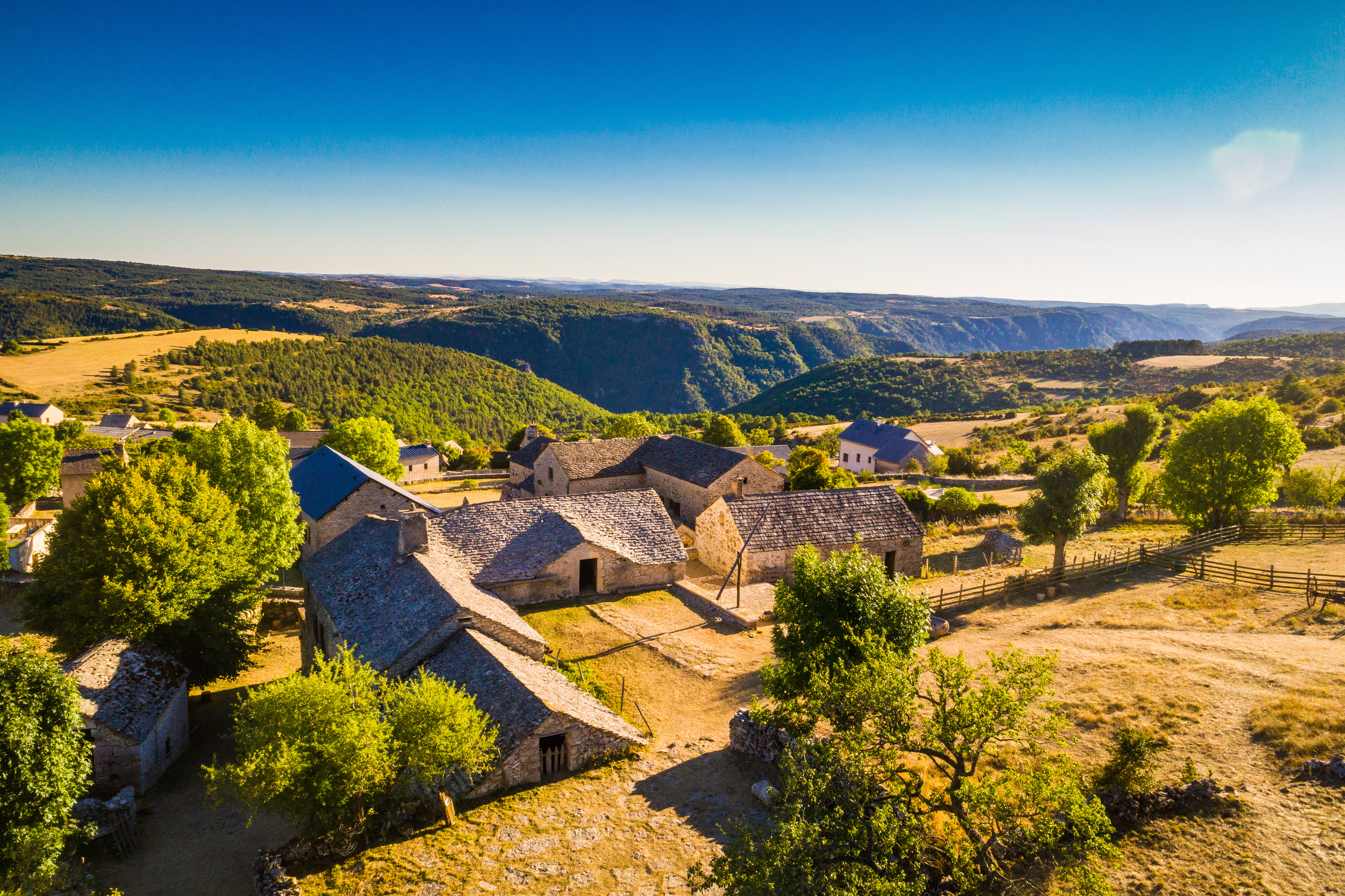 Vue vers les Gorges de la Jonte et la Causse Noir depuis la Ferme Caussenarde d'Autrefois (Causse Méjean